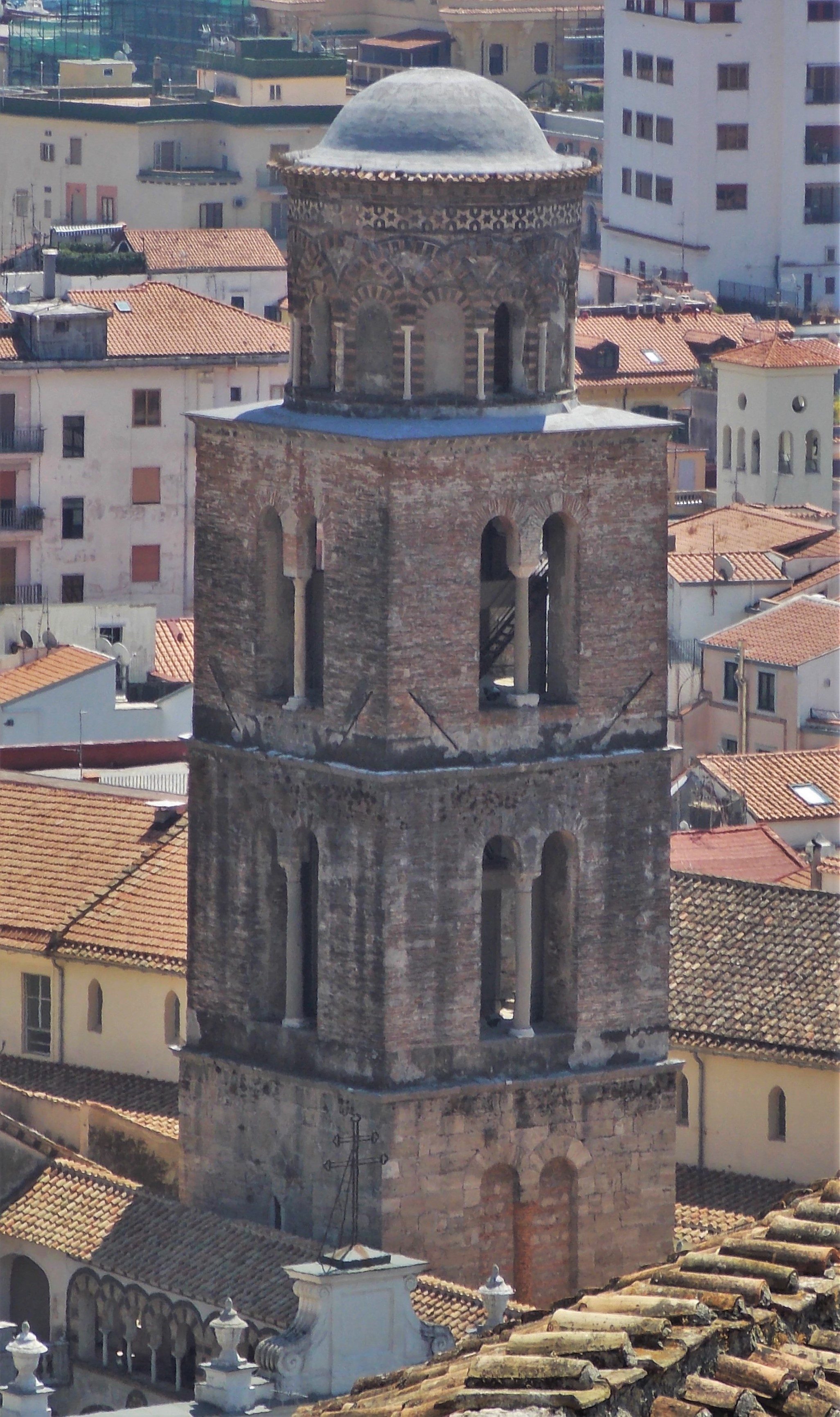 Campanile